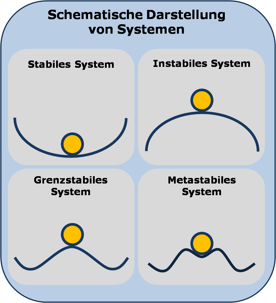 Schematische Darstellung von stabilen, instabilen, grenzstabilen und metastabilen Systemen.